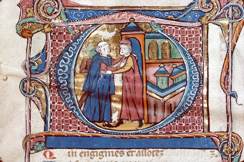 F002v-Chasse à la biche - Autruche